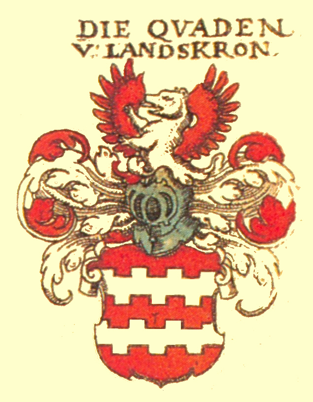 Wappen der Rheinländischen Adelsfamilie Quadt